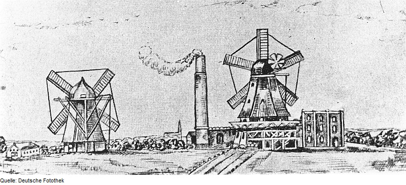 Original image description from the Deutsche Fotothek Schwerin. Die Jassenmühlen an der Wittenburger Chaussee, um 1890, aus: Mecklenburger Jahrbücher, 1932 (Achtung: Diese Beschreibung ist falsch. Es handelt sich um die Janssen-Mühlen. Die Fotothek wurde informiert.)